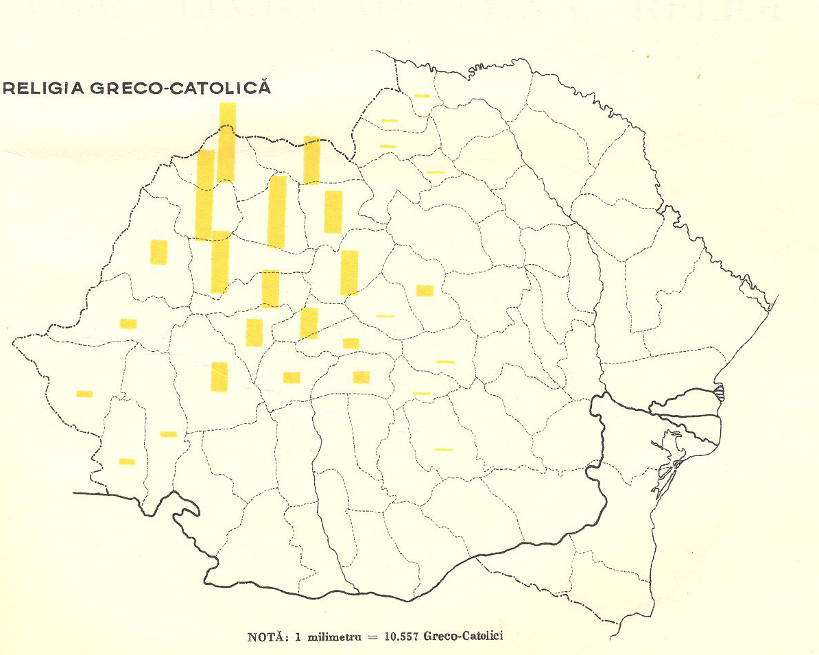 Numărul de greco-catolici pe regiuni, conform recensământului populației din 1930